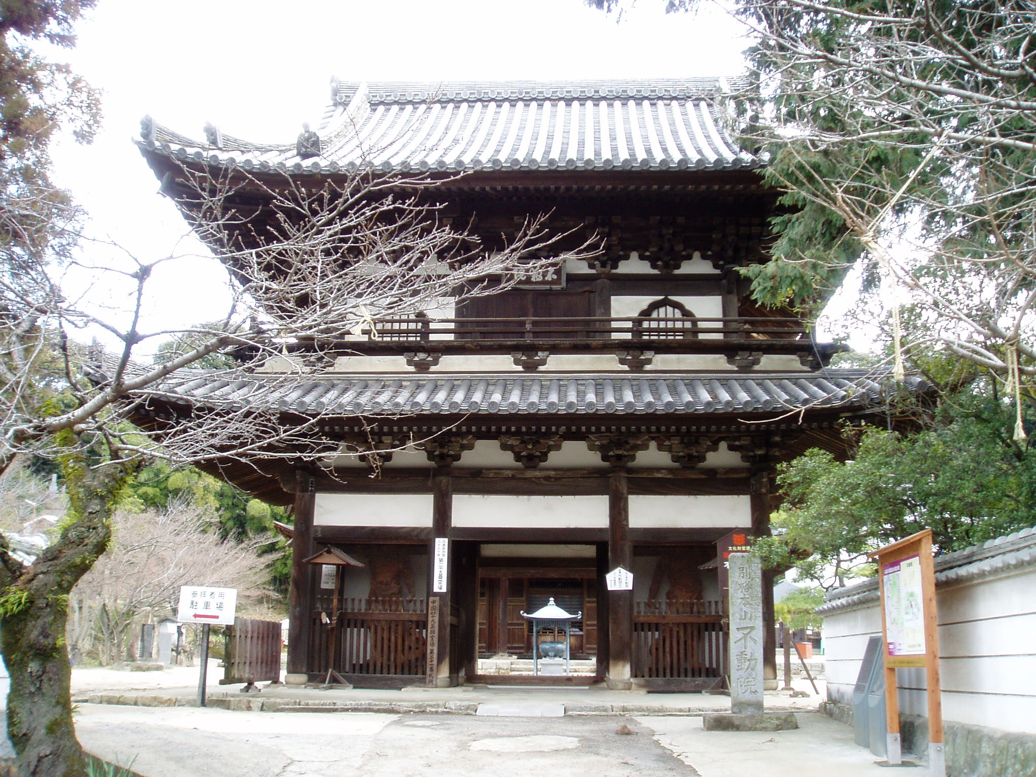 Fudoin Romon (不動院楼門) in Higashi-ku, Hiroshima, Hiroshima, Japan.